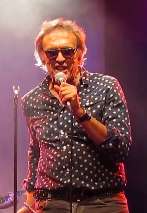 Auteur-compositeur-interprète français